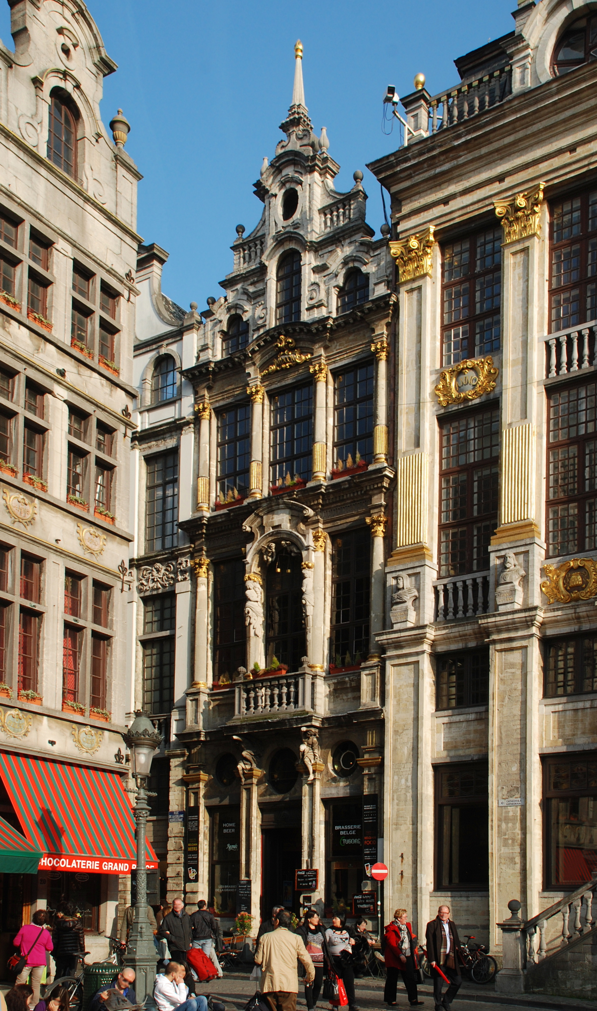 Belgique - Bruxelles - Grand-Place - Maison de la Balance